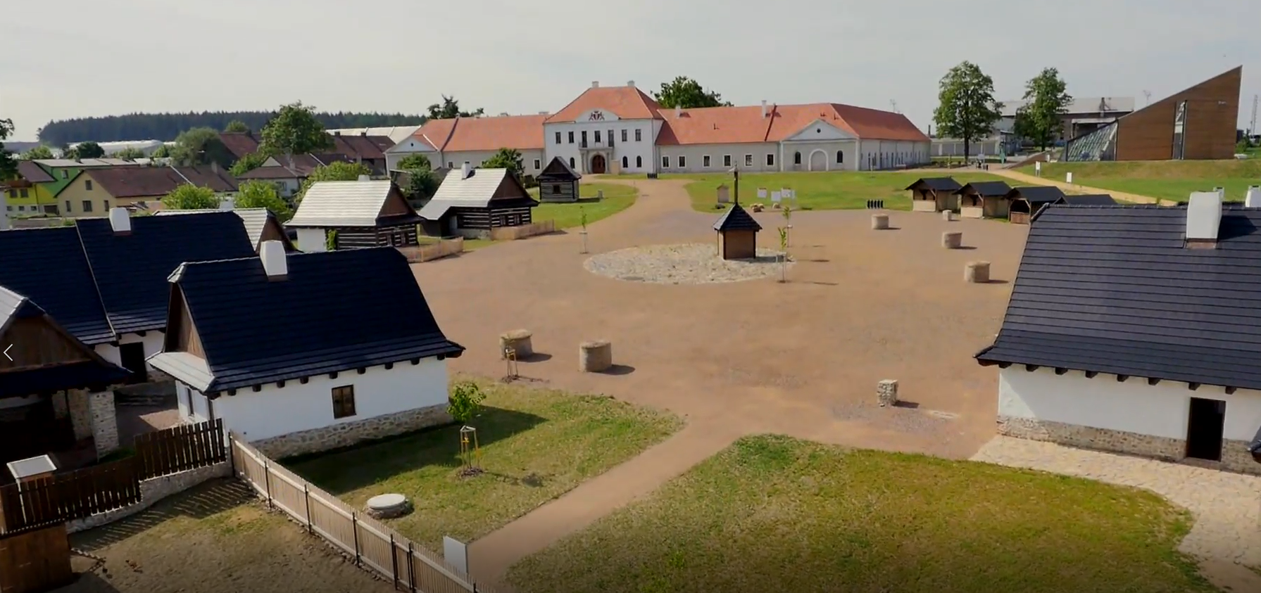 Centrum Eden pohled na areál.